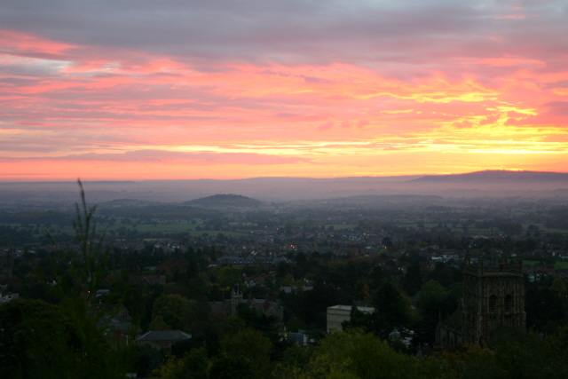 Taken myself